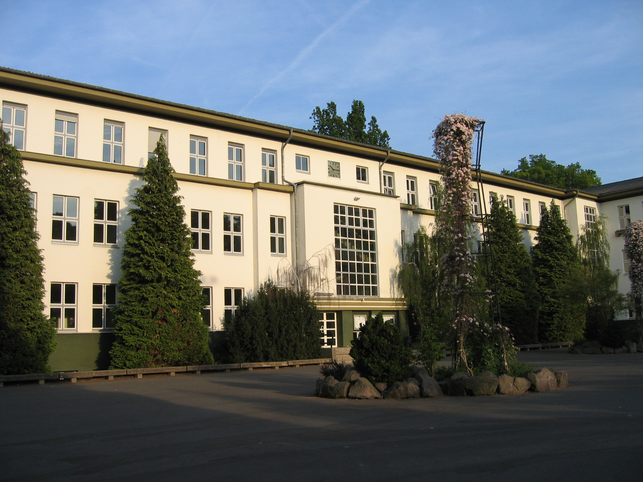 Aloisiuskolleg, Bonn-Bad Godesberg